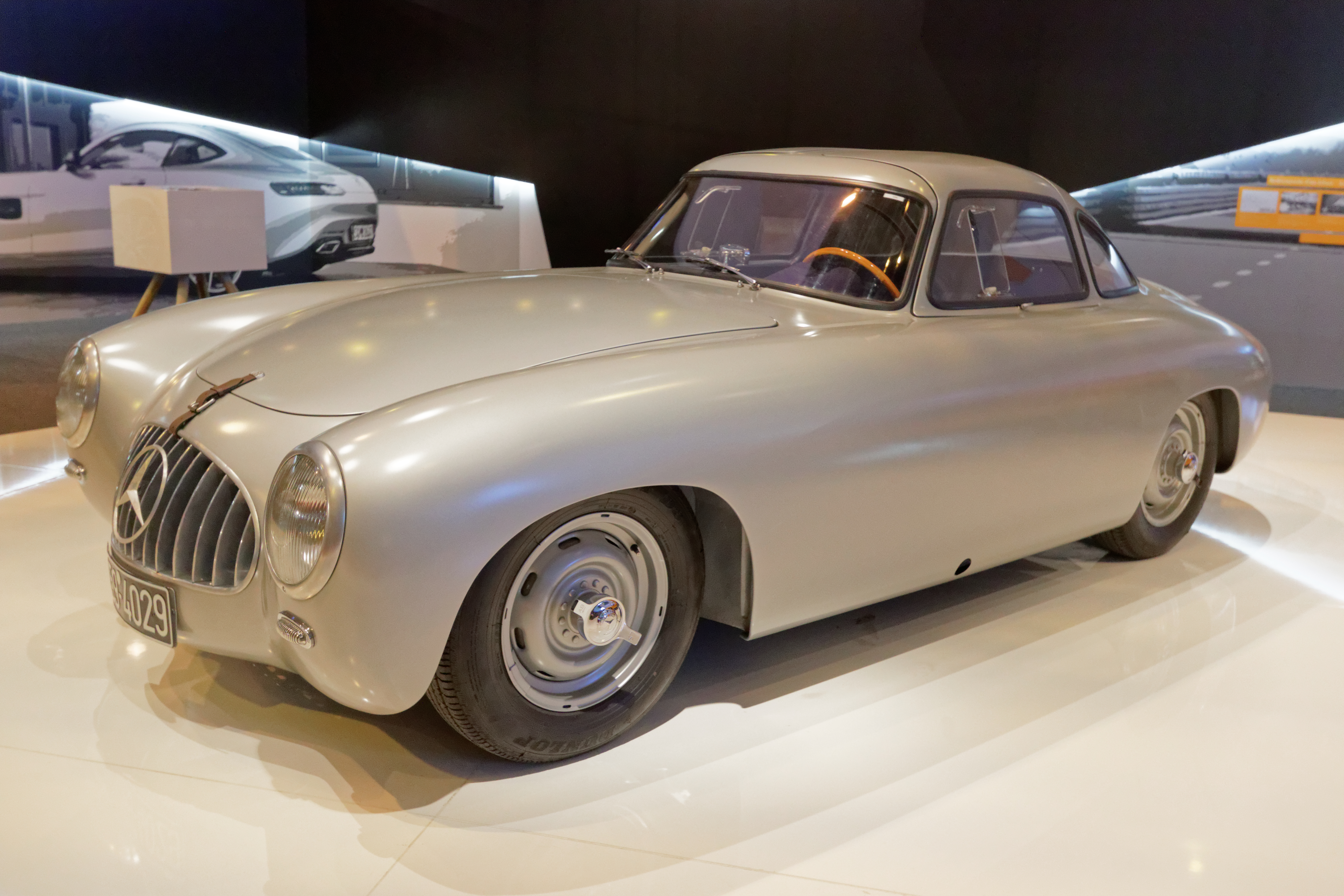 Une des voiture présentée lors du salon Rétromobile de Paris 2015